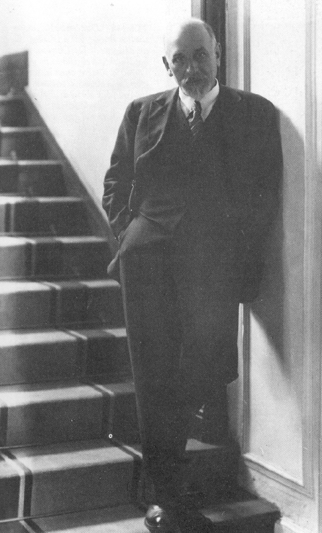 Luigi Pirandello in un ritratto del 1919.